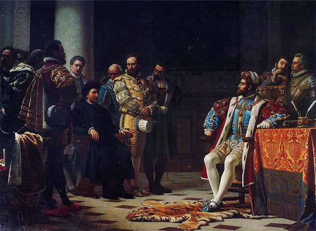 Quadro di Luigi Toro conservato nel "Salone dei Quadri" del municipio di Sessa Aurunca